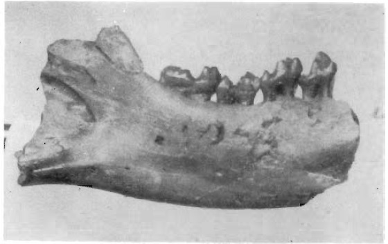 Altanius orlovi gen.n., sp.n., left lower jaw.